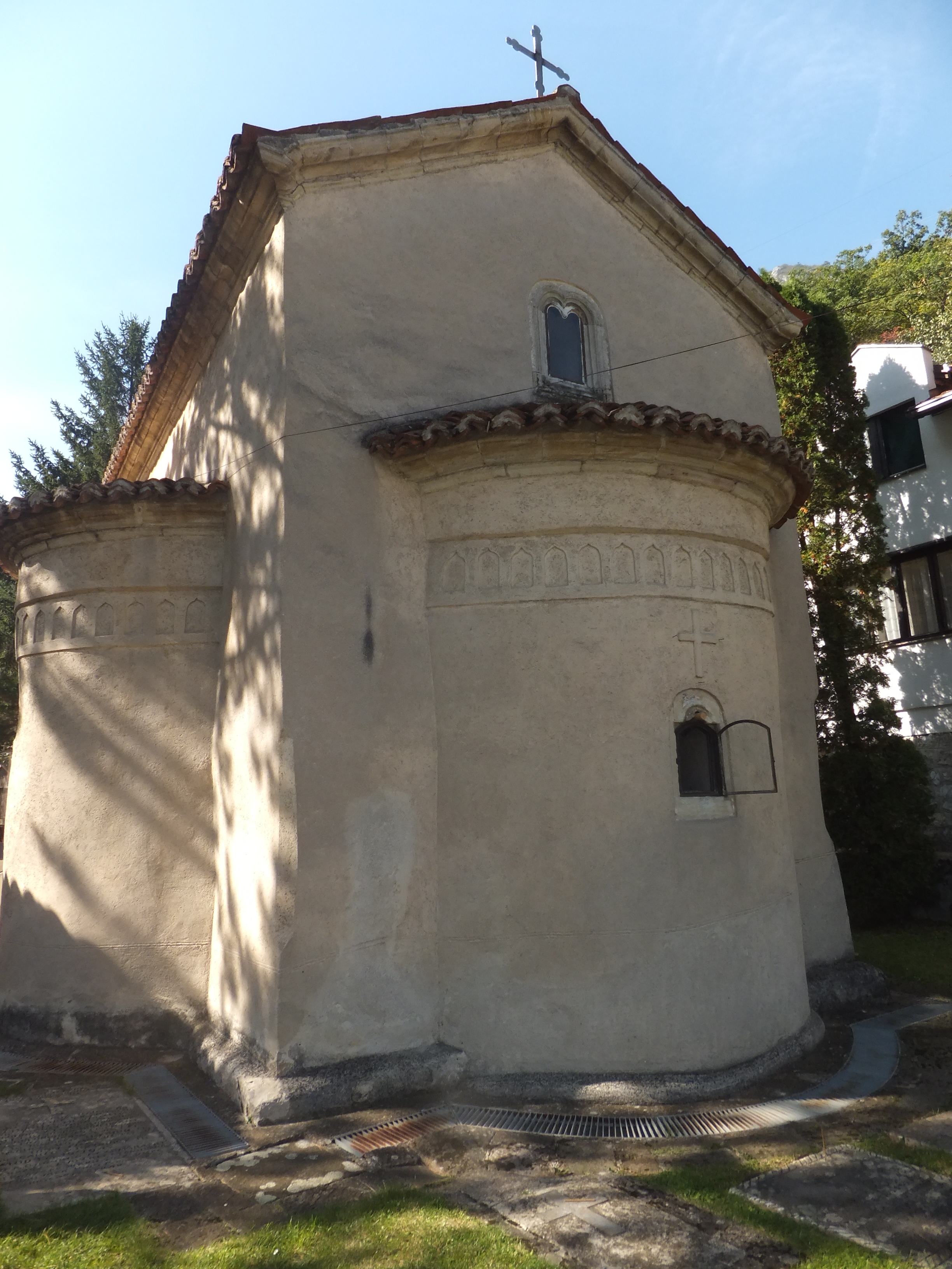 Манастир Никоље Кабларско